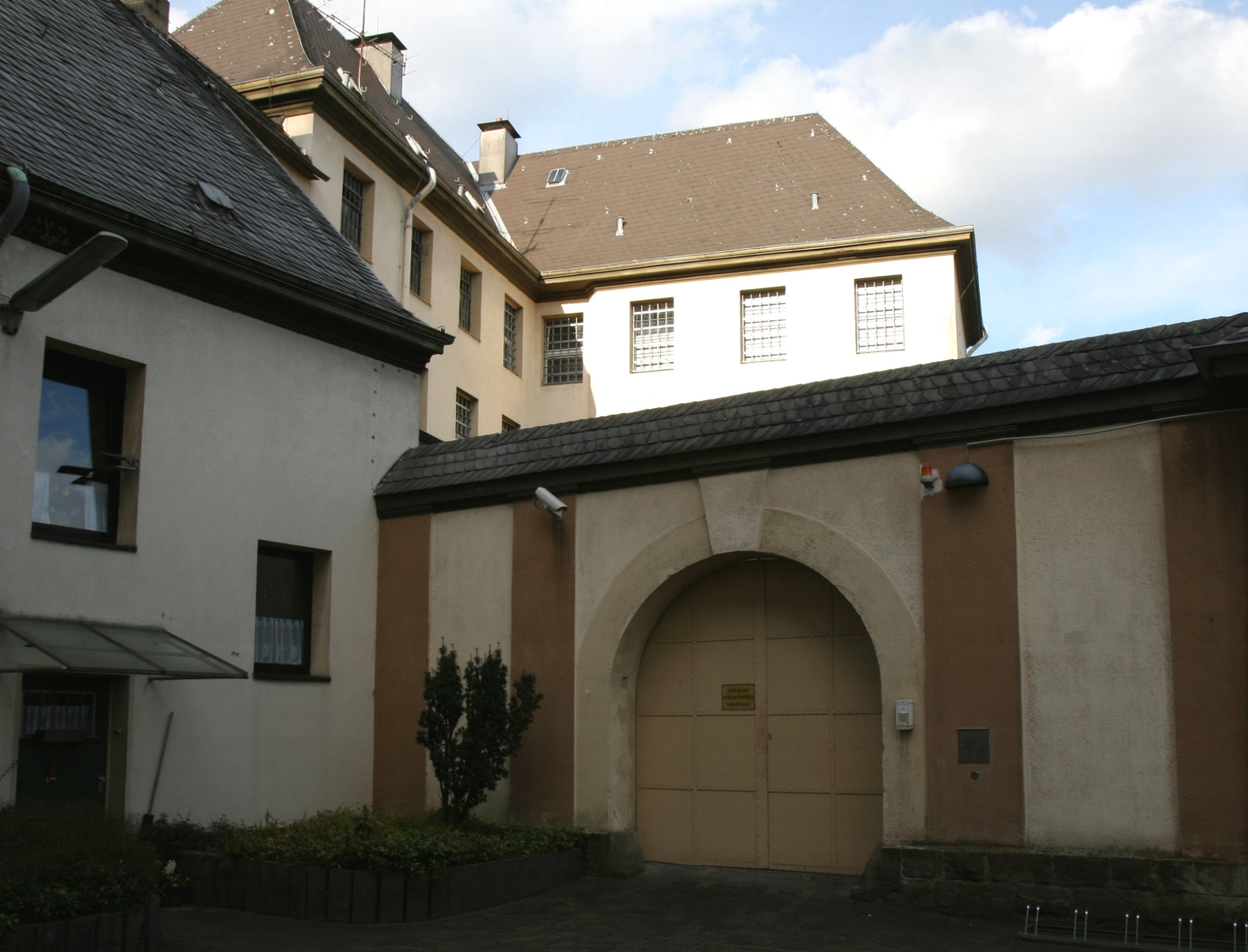 Jugendarrestanstalt beim Amtsgericht Wetter (Ruhr) in der Stadt Wetter (Ruhr), Nordrhein-Westfalen.